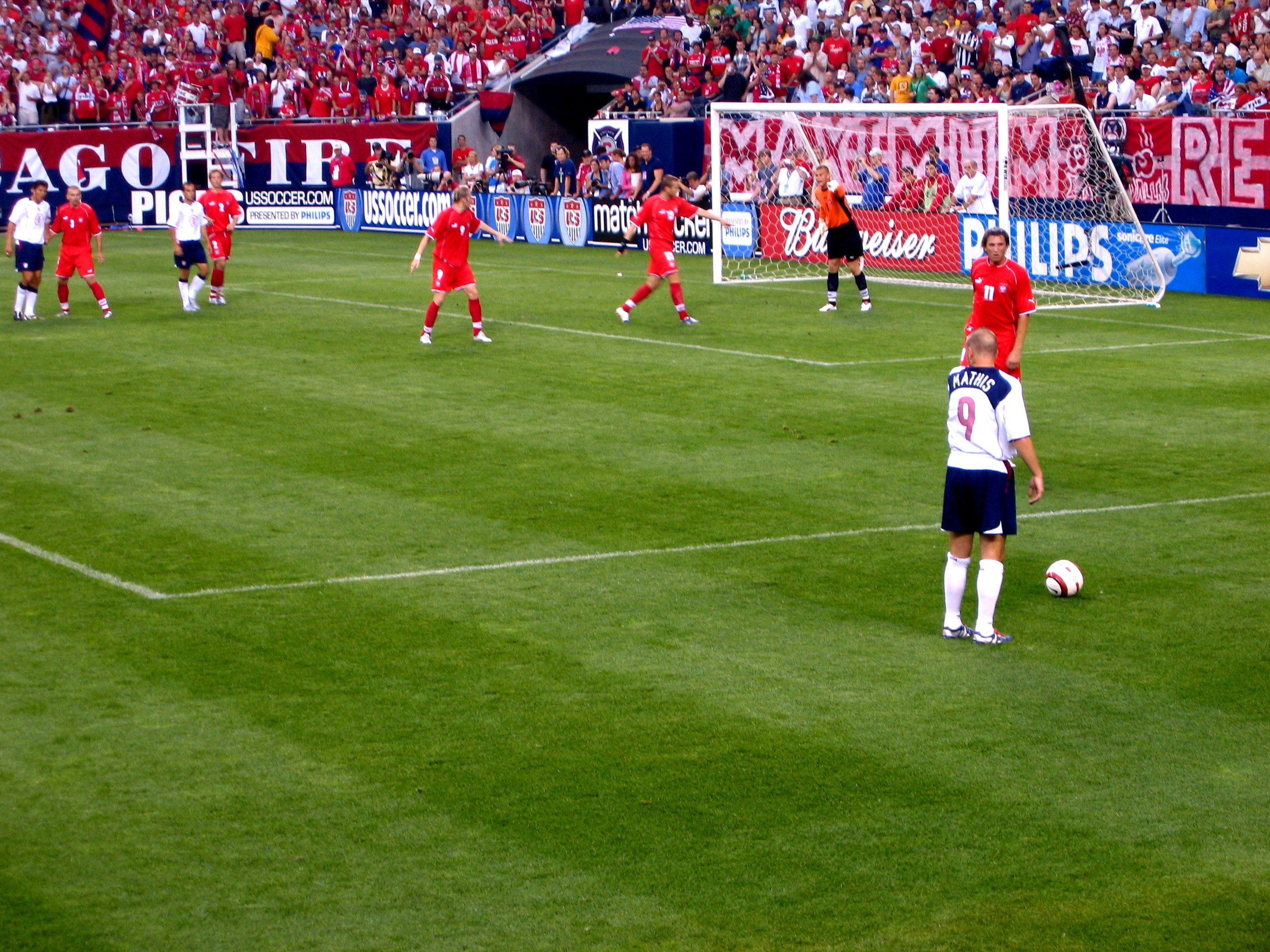 ארצות הברית מול פולין ב-2004.